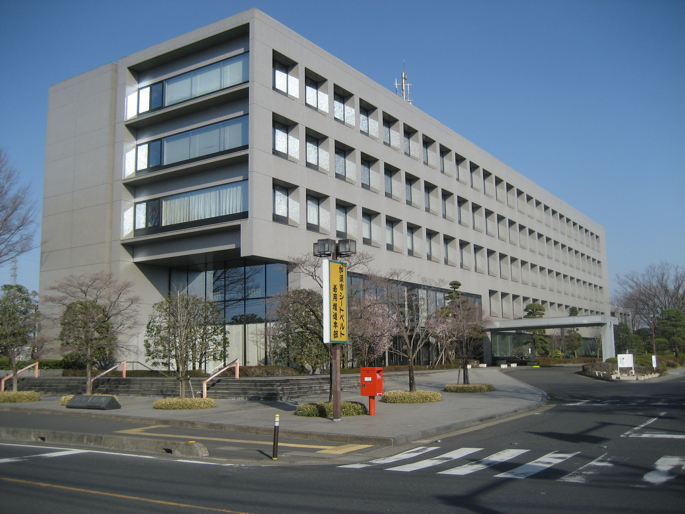 加須市役所庁舎（駐車場入口付近から撮影）